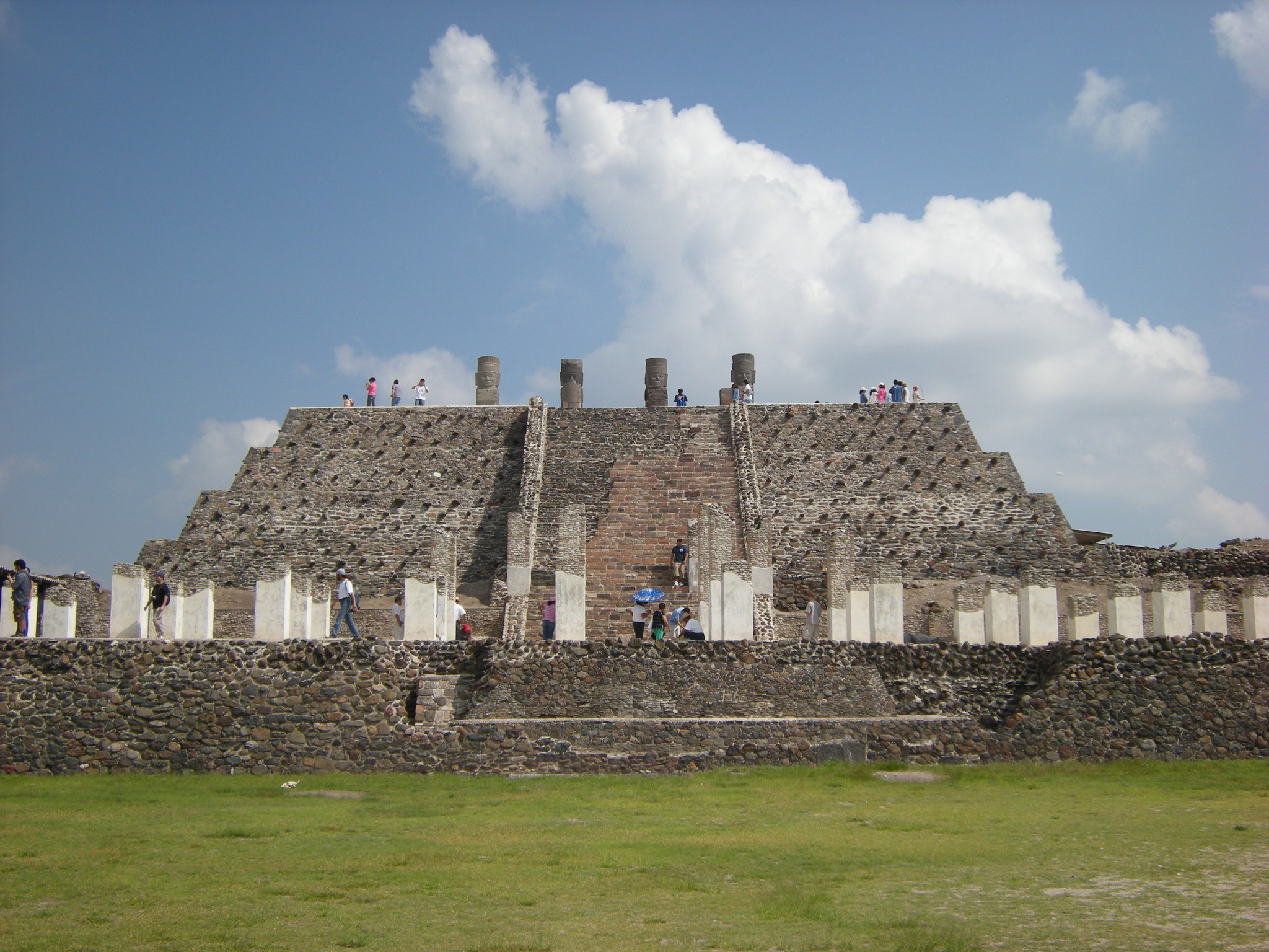 Templo Tlahuizcalpantecuhtli. Zona arqueológica de Tollan Xicocotitlan (Tula), México